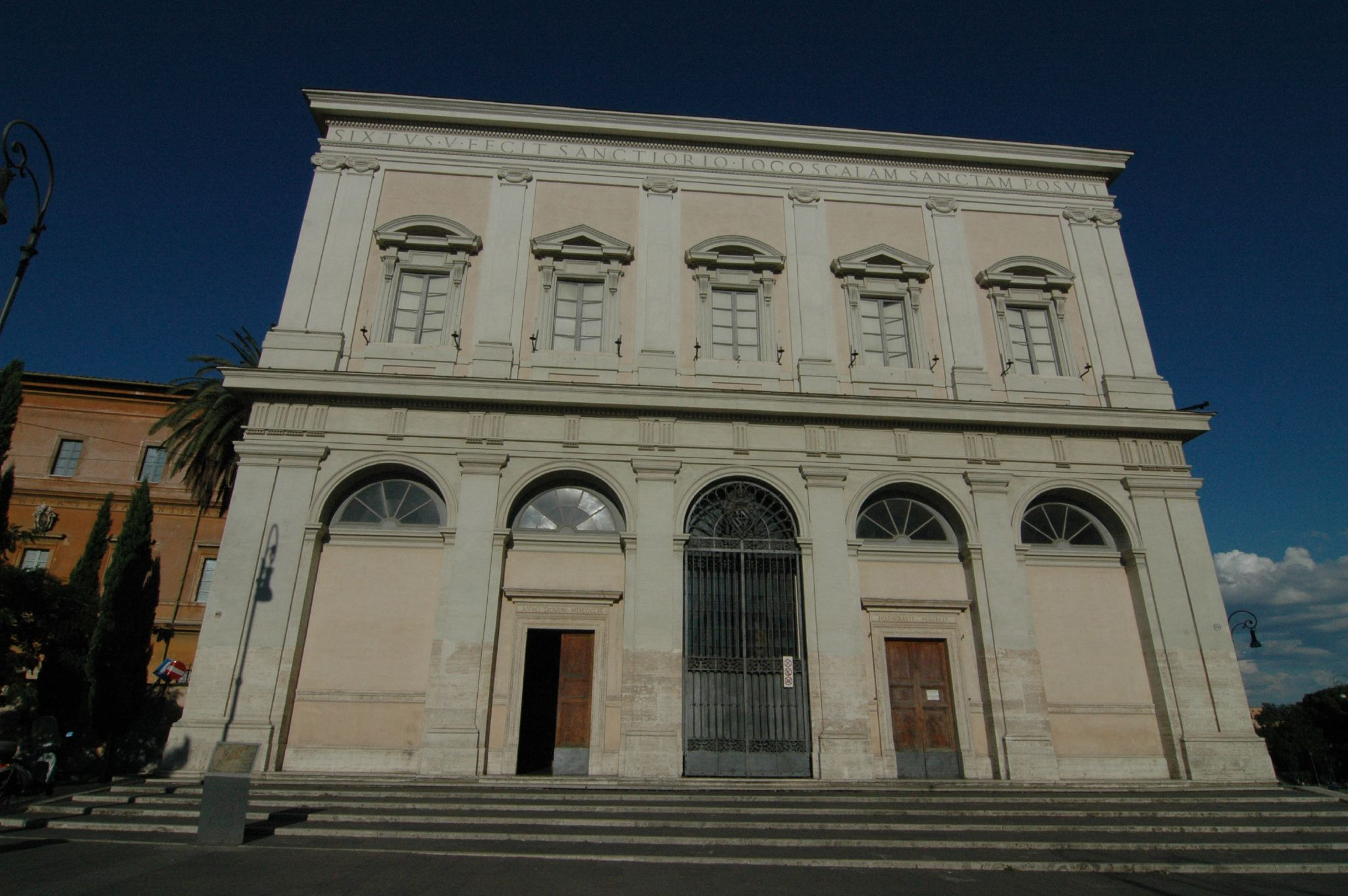 L'edificio della Scala Santa, a Roma.